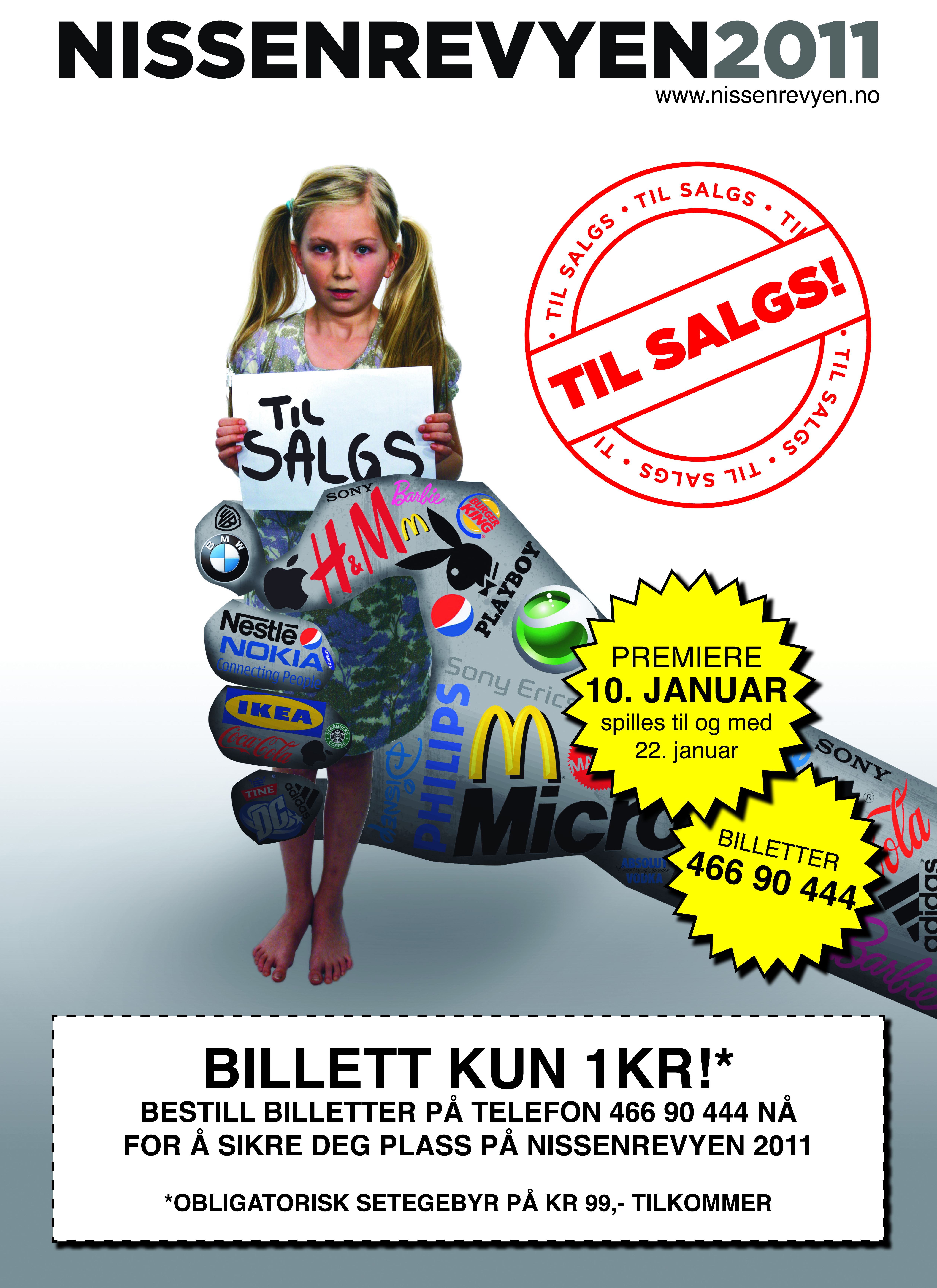 Nissenrevyen 2011